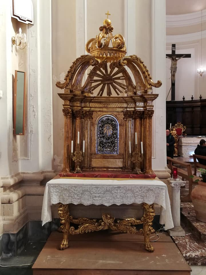 Navata sinistra.